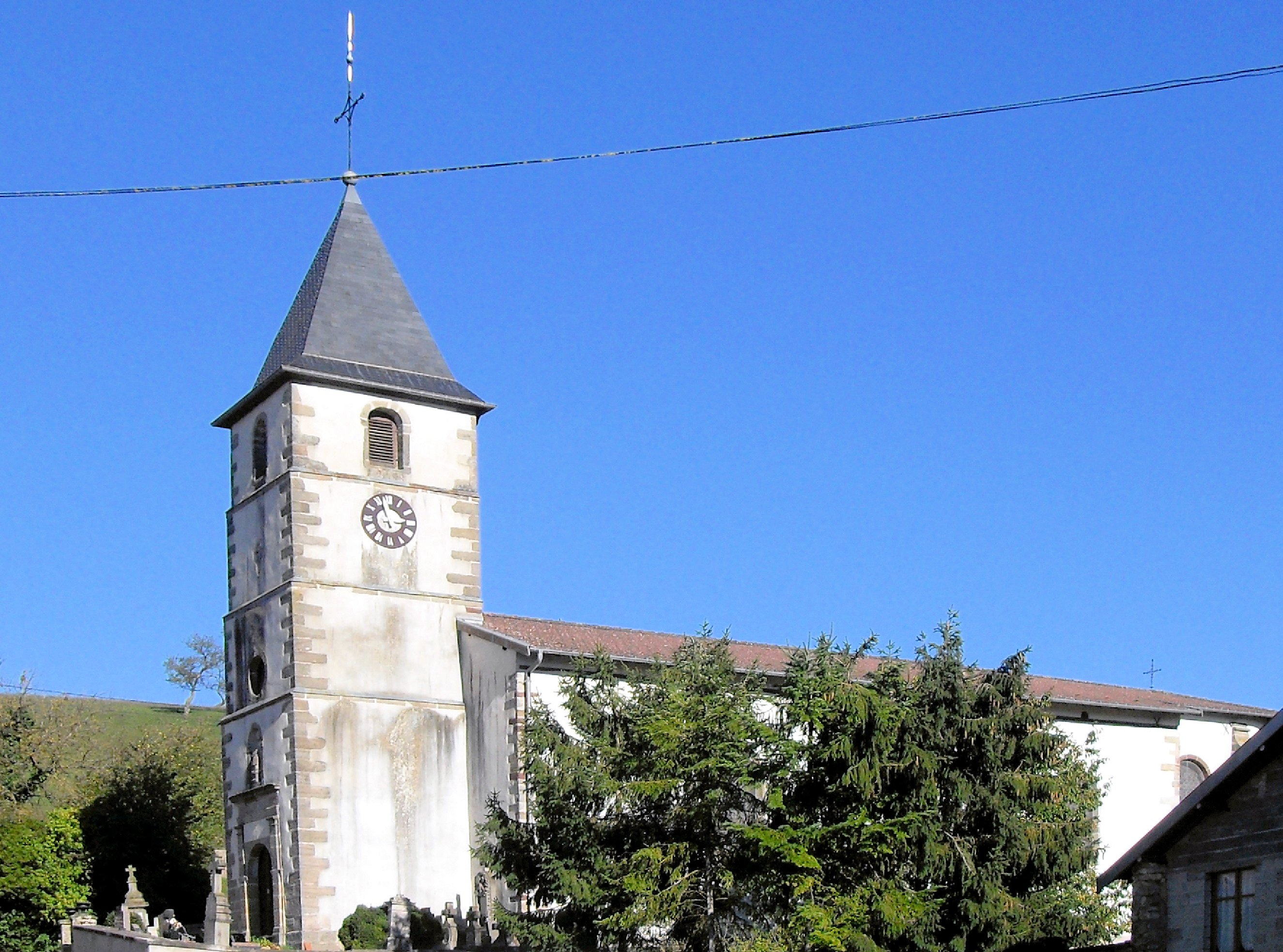 L'église Saint-Remy à Bazoilles-et-Ménil